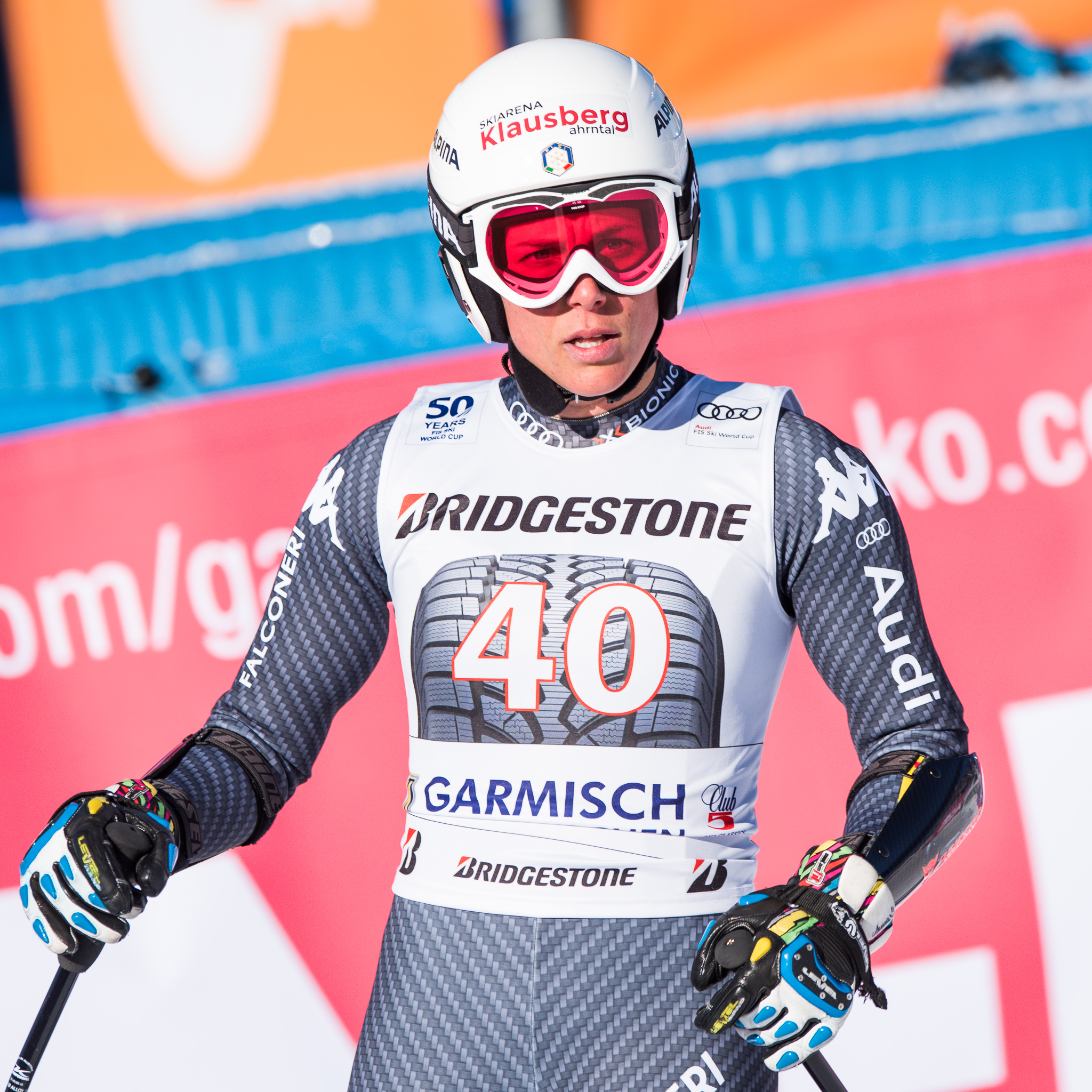 64. Kandahar Rennen,Anna Hofer,Audi FIS Ski Weltcup Garmisch-Partenkirchen,Damen Super-G,Kandahar,Ladies Super-G